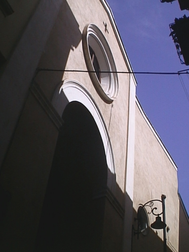 Chiesa della Purissima, XVI secolo, Cagliari